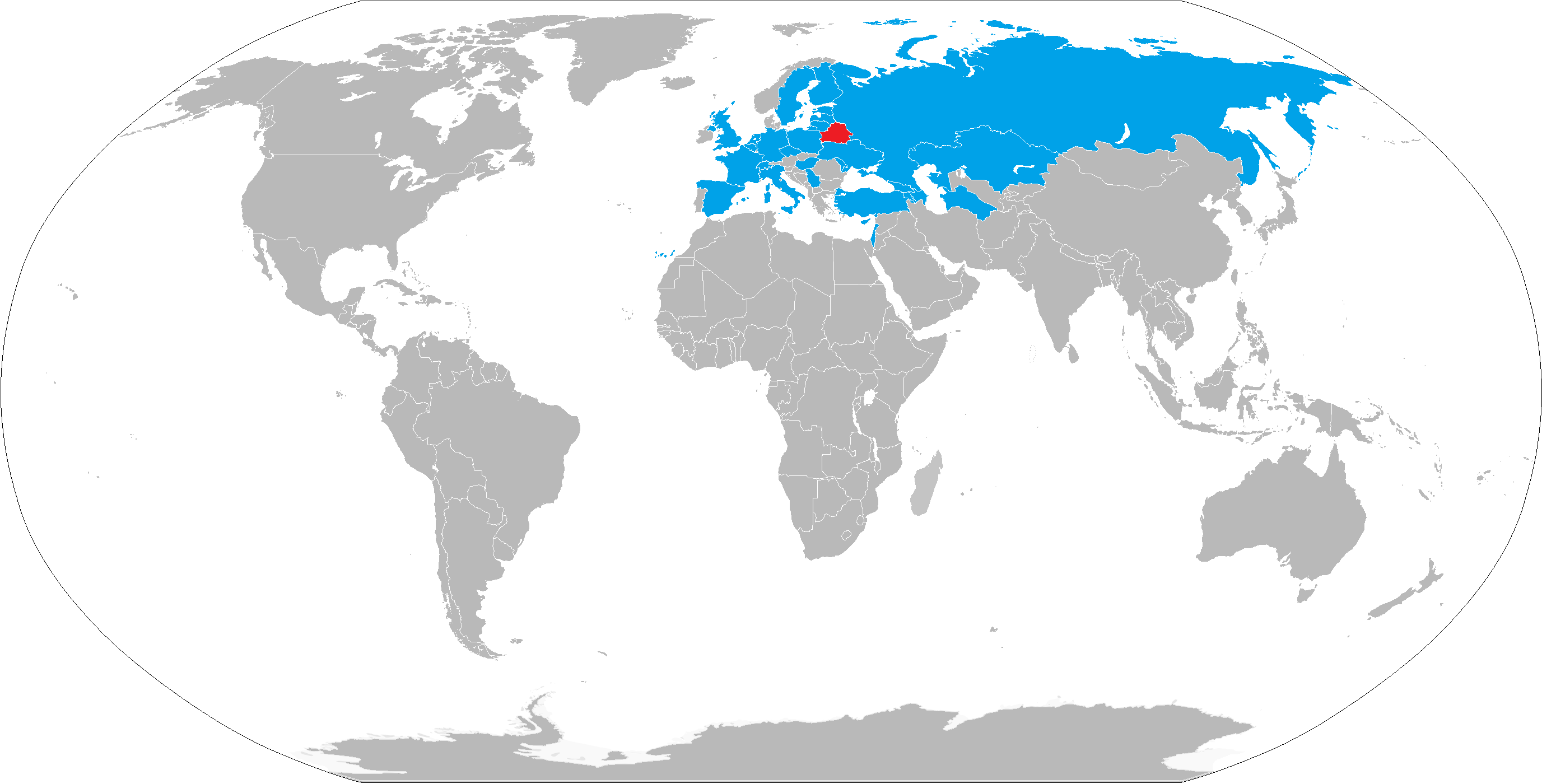 mapa regularnych kirunkau Belavia